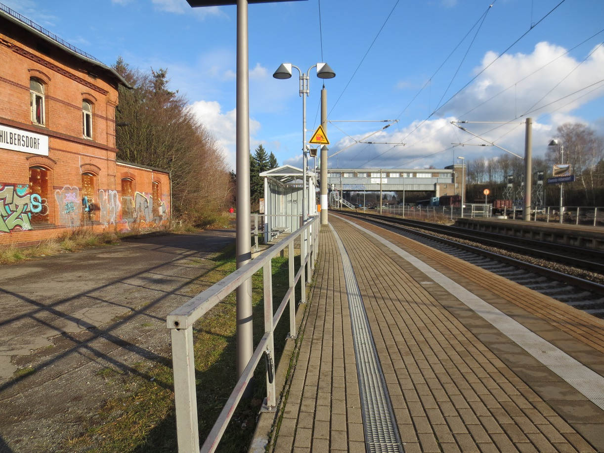 Bahnhofsgebäude. Leerstehend. Steht zum Verkauf. Stand: 2014.